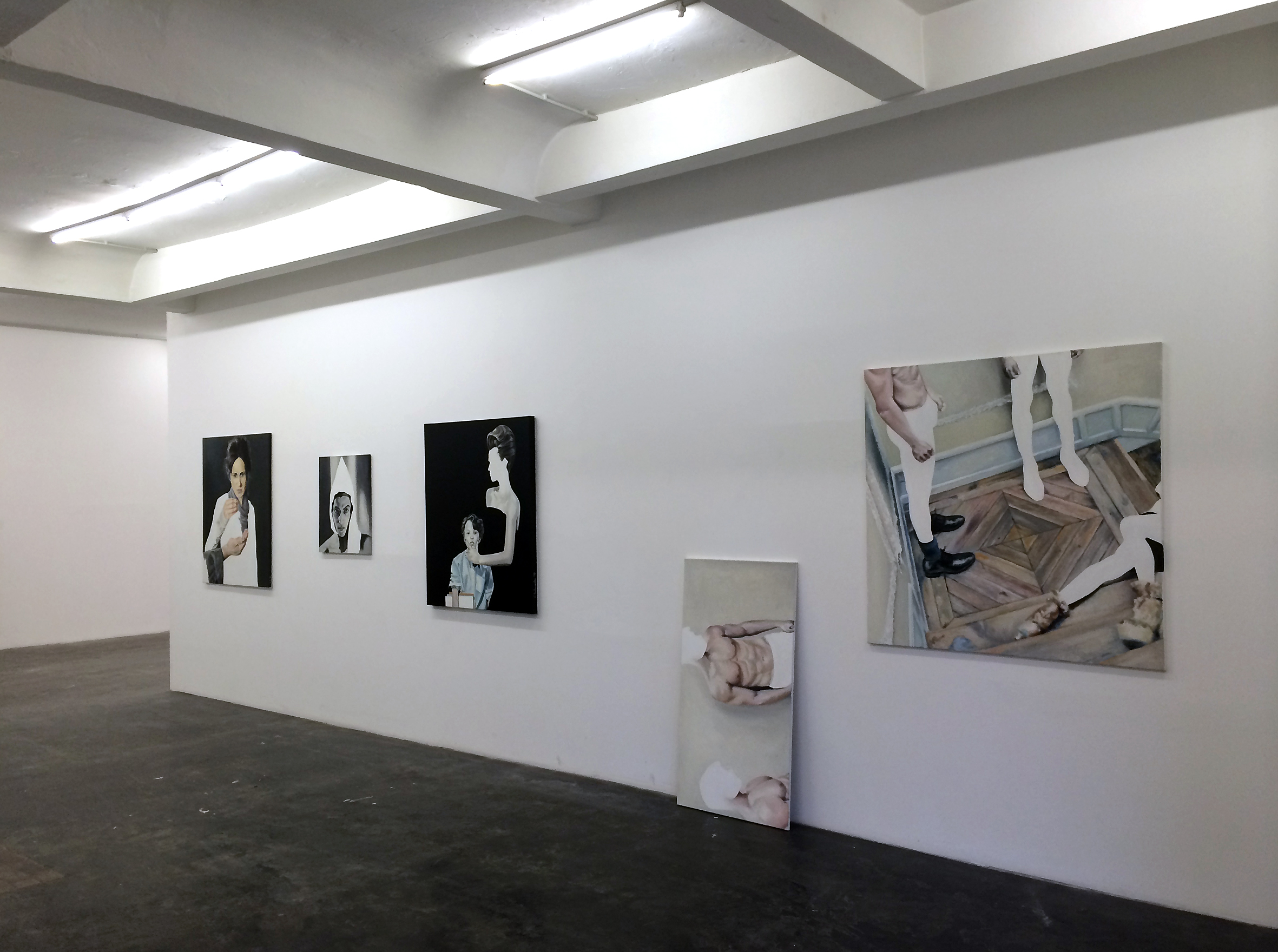 Arbeiten von Constantin Schroeder auf der P/ART 2014 in Hamburg. Courtesy: REINHARDT & PARTNER